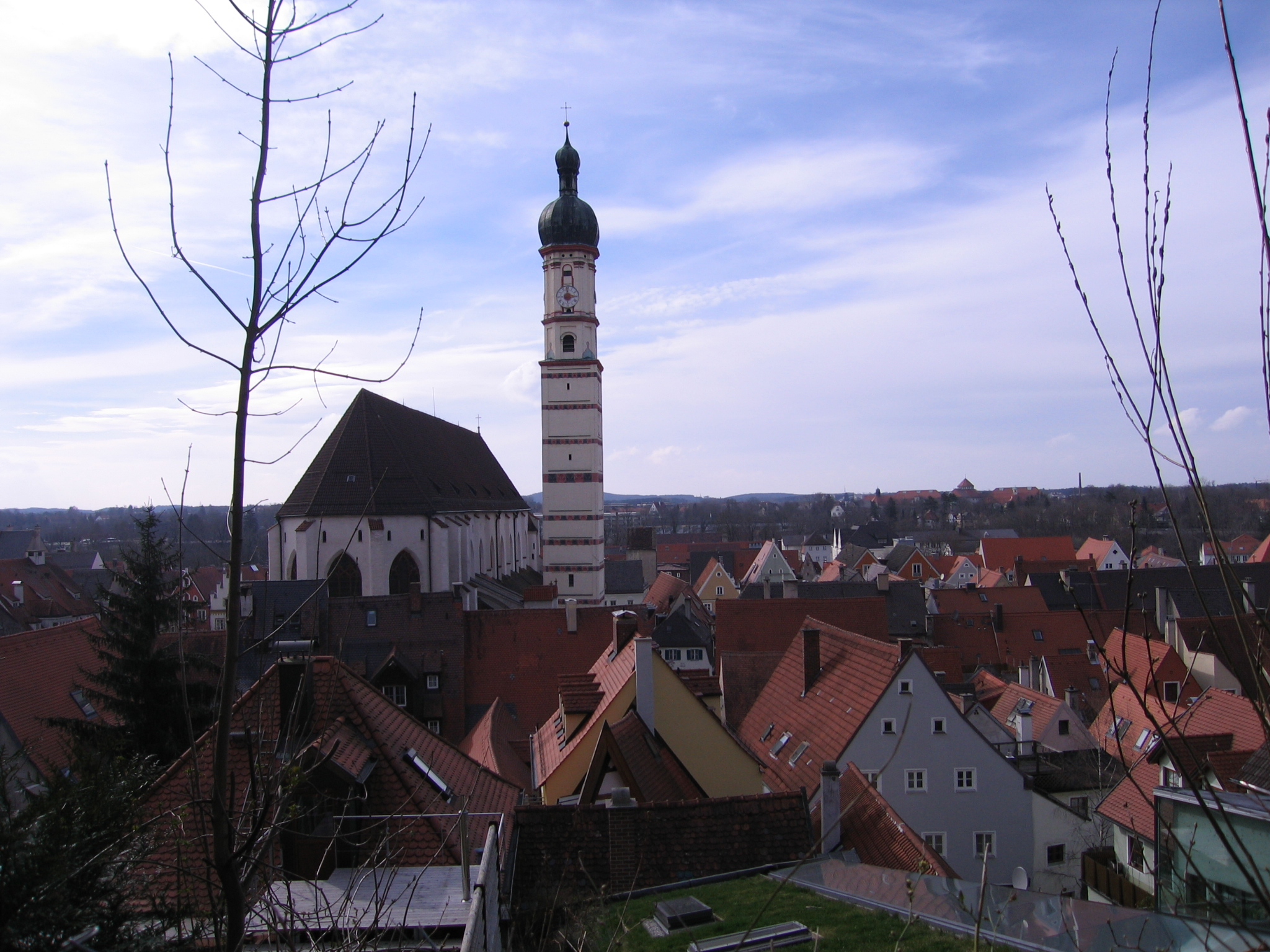 Panorama Landsberg am Lech mit Stadtpfarrkirche Mariä Himmelfahrt